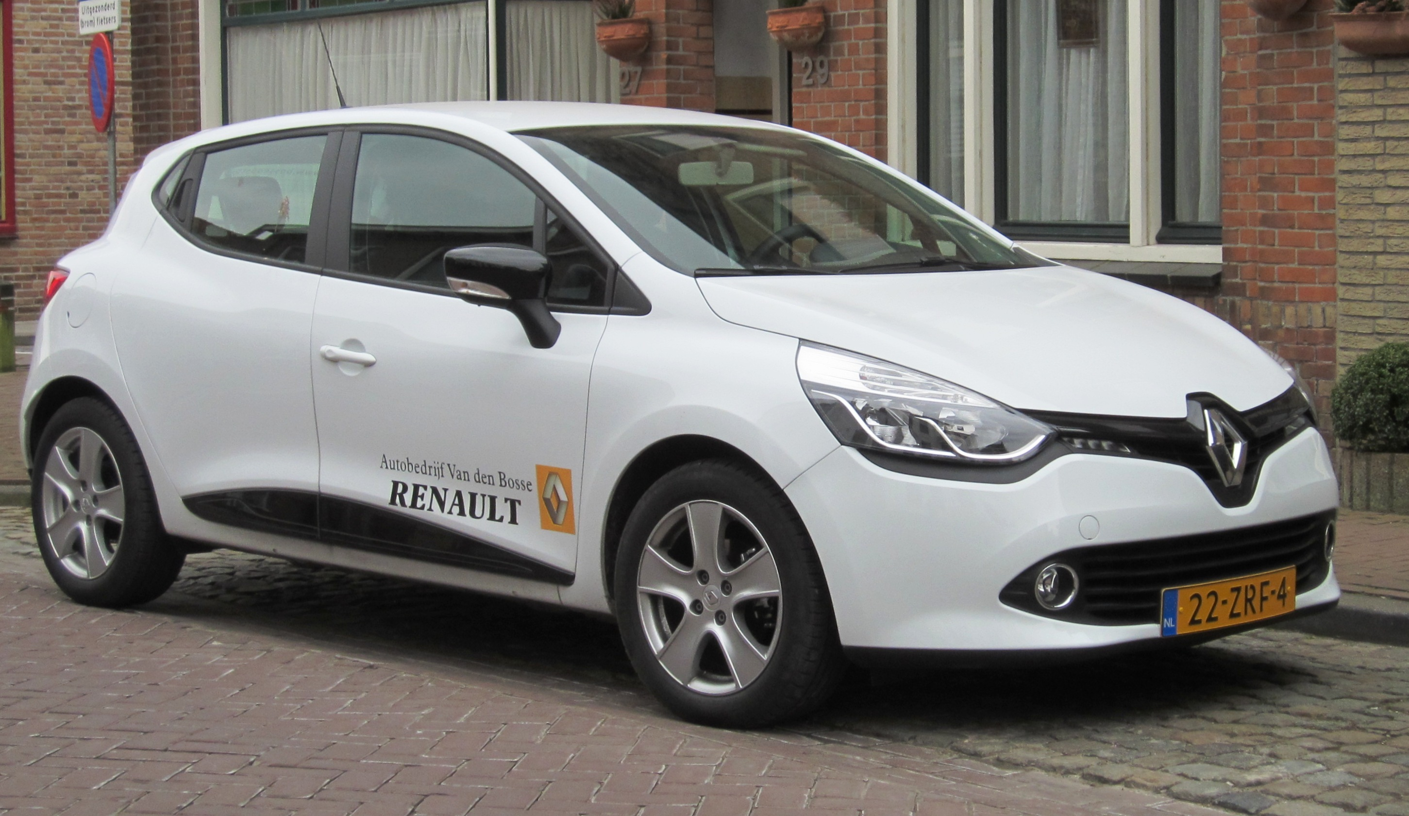 Renault Clio TCe a 5 portes